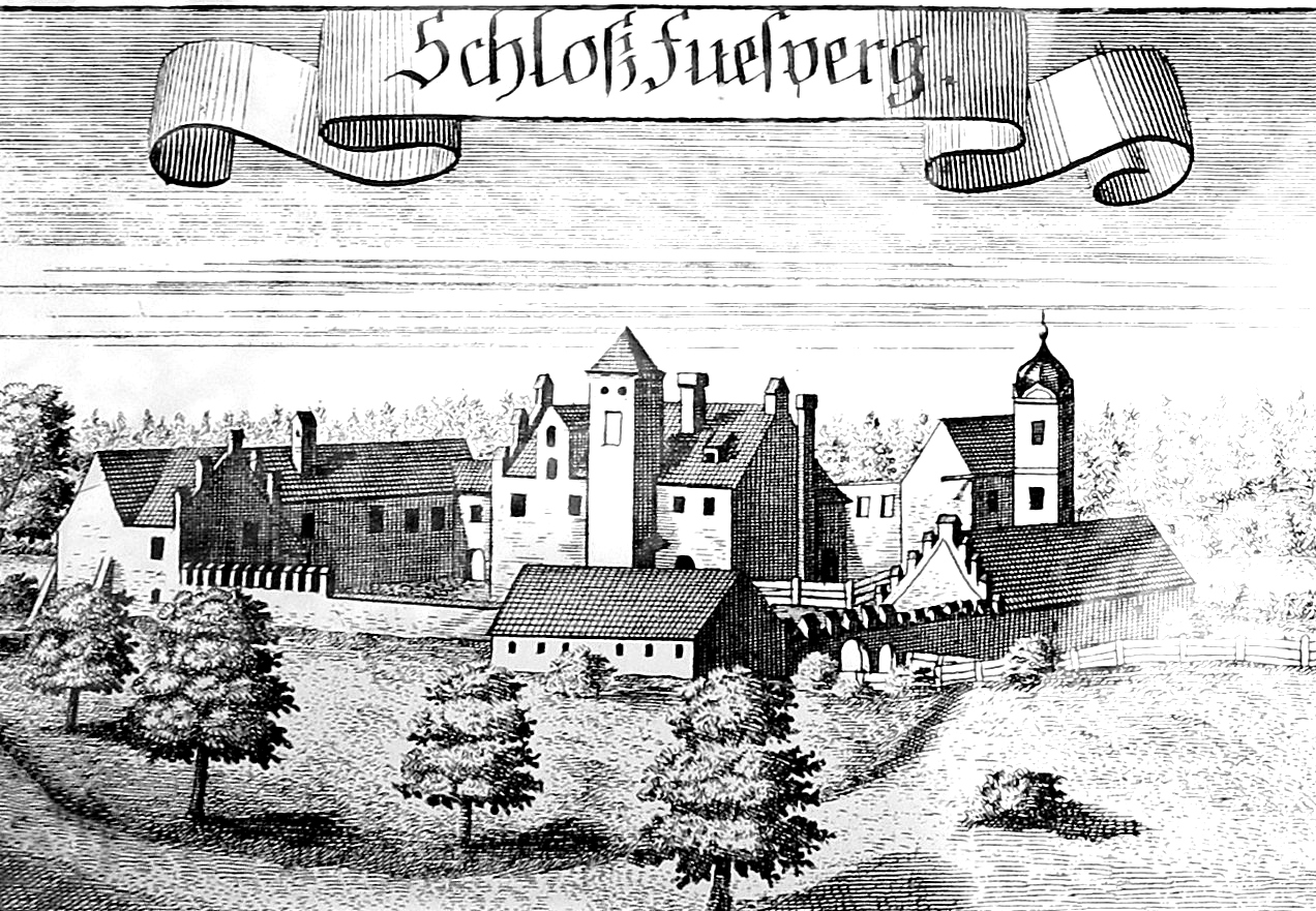 Stich des Bayerischen Hofkupferstechers Michael Wening vom Schloß Fußberg in Gauting um 1700 aus deren Gemeindearchiv